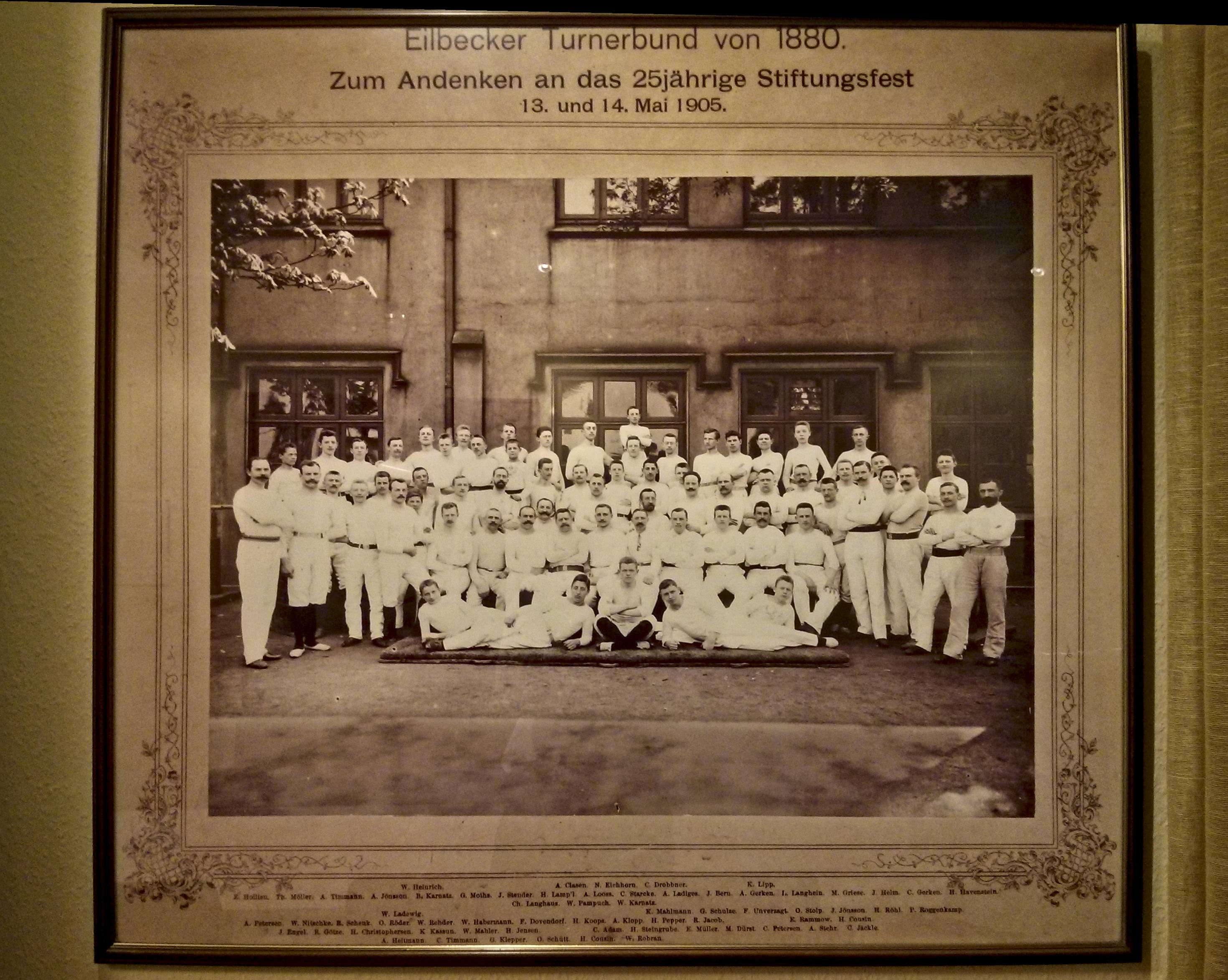 Foto des 25jährigesn Stiftungsfest 1905